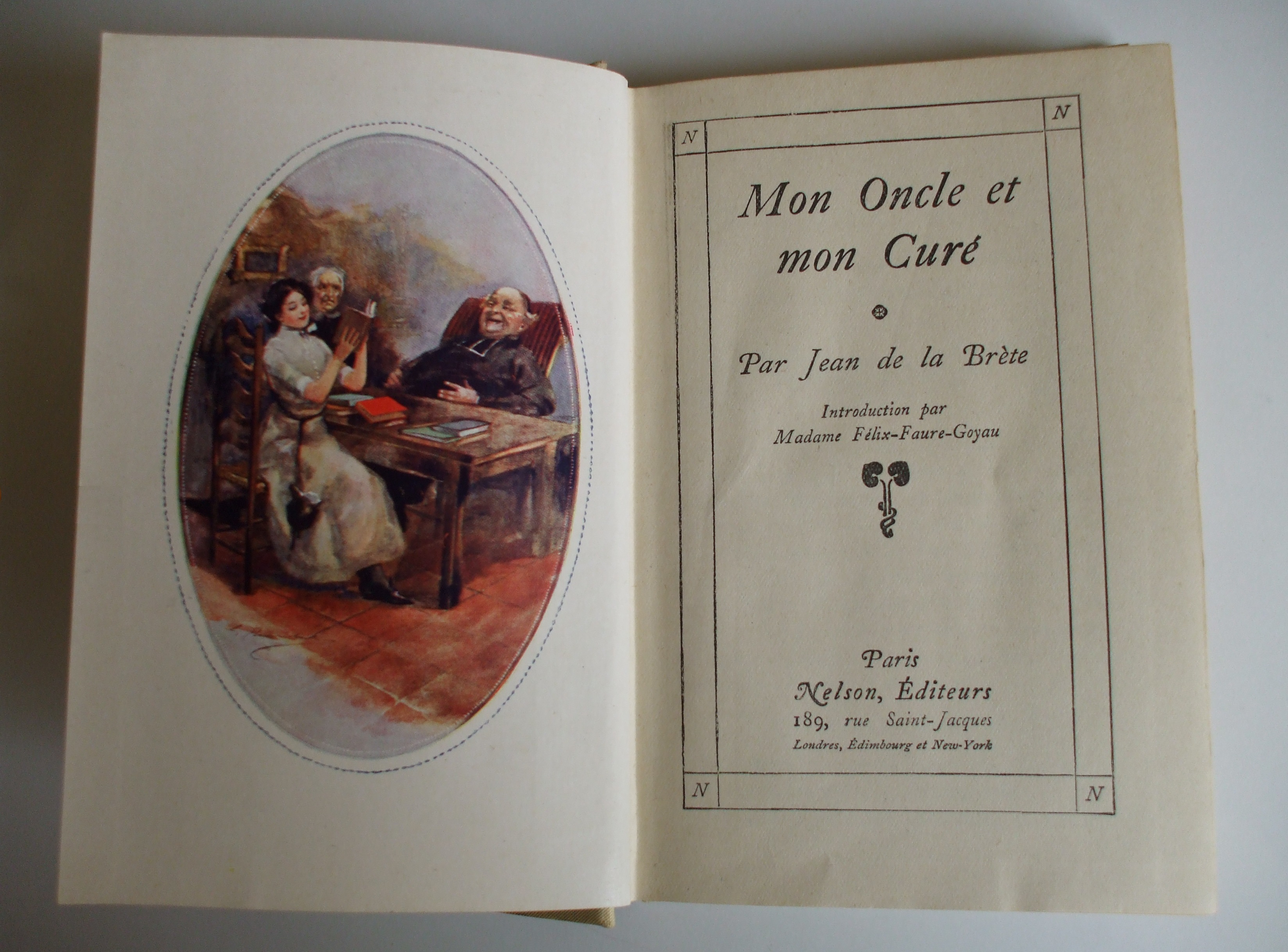 Page de titre de "Mon oncle et mon curé" de Jean de La Brète (éditions Nelson)